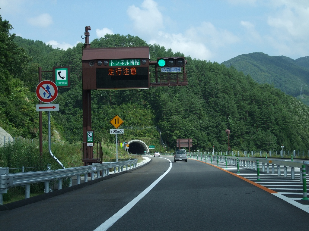 東海北陸道 二本木トンネル付近の信号機（飛騨清見IC～白川郷IC） ここから白川郷インターチェンジまで10本（計20.7km）のトンネルの連続